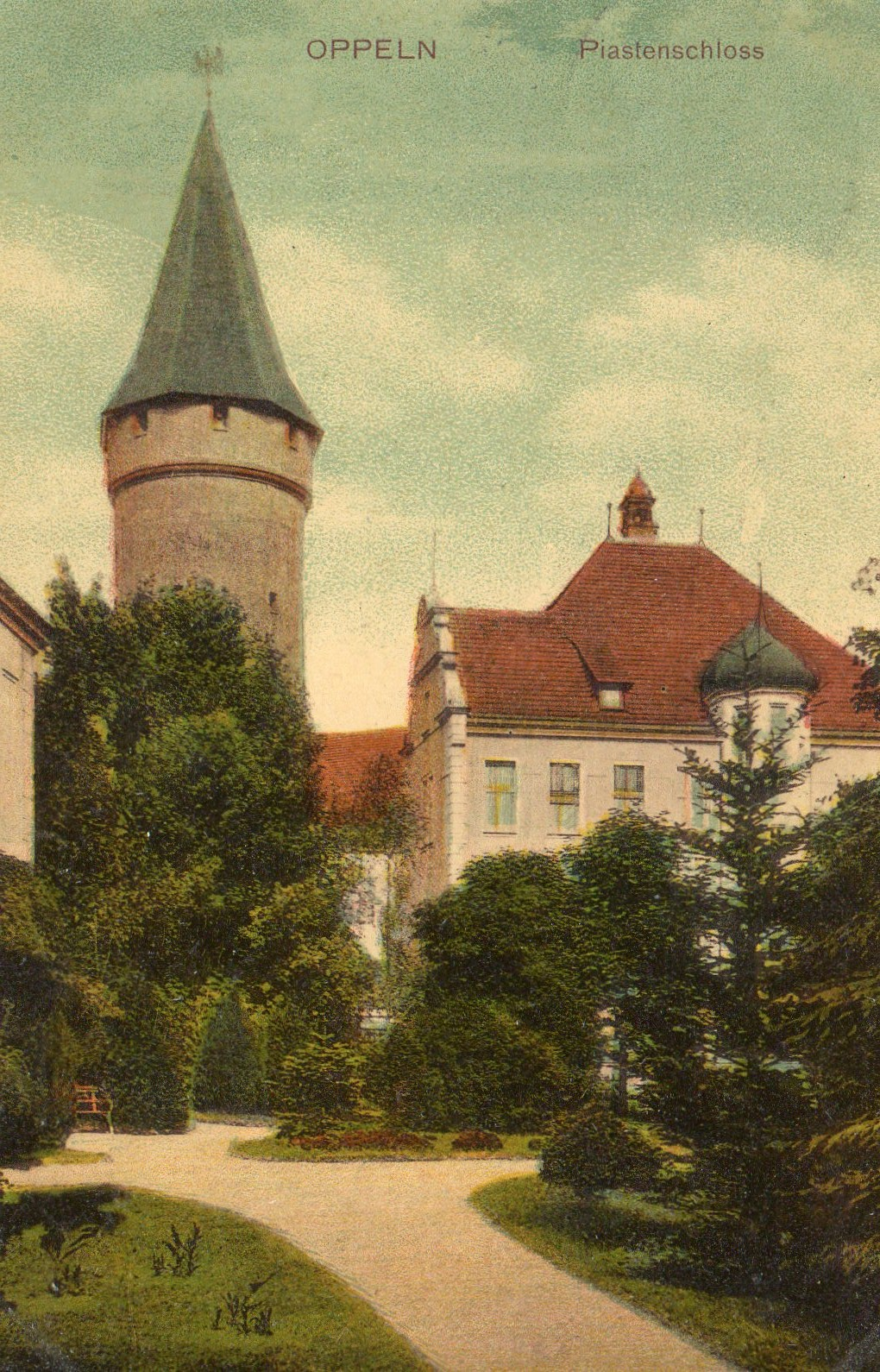 Grtenansicht, alte Ak